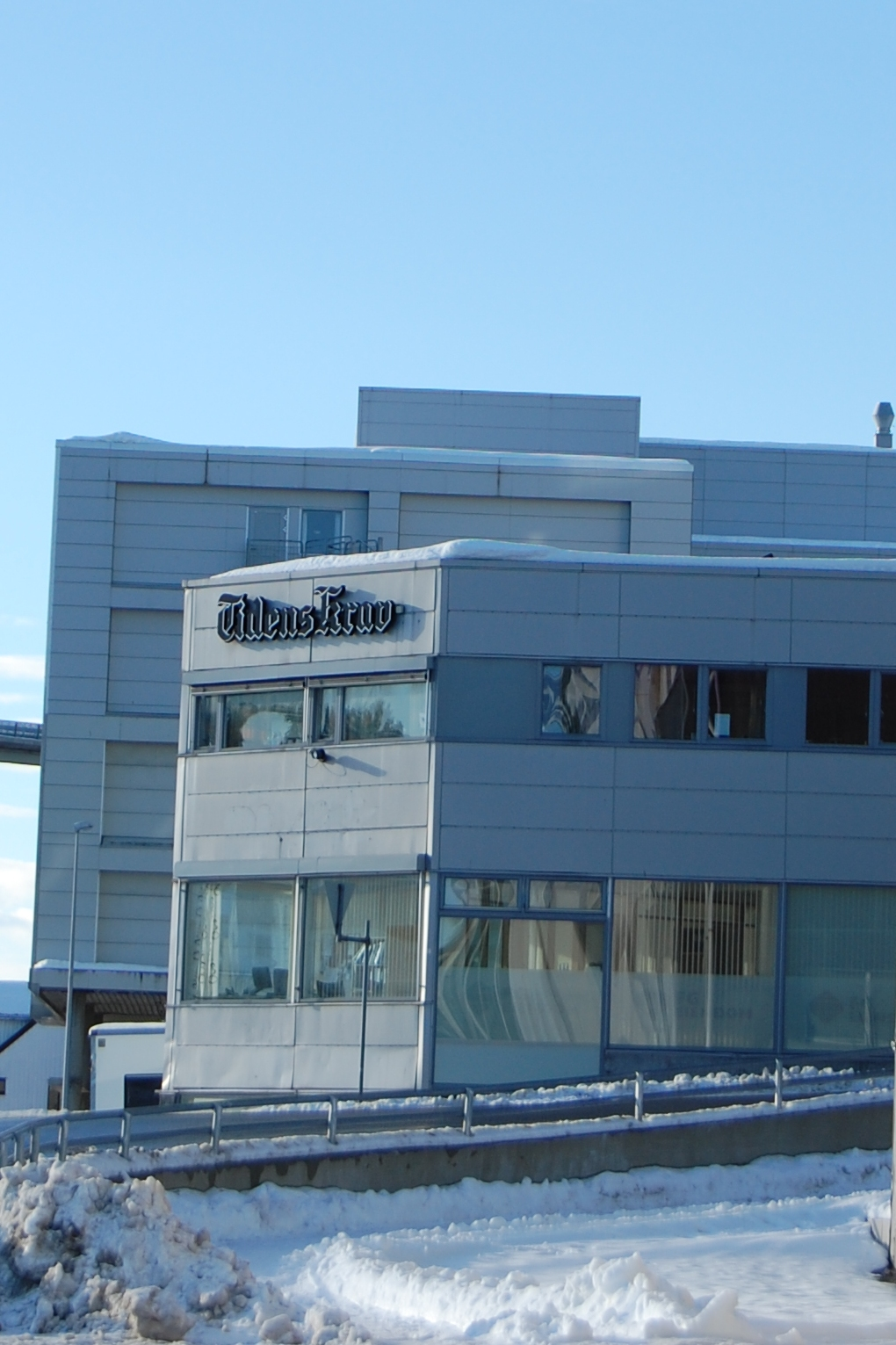 Del av fasaden til avisen Tidens Krav sine lokaler i Kristiansund